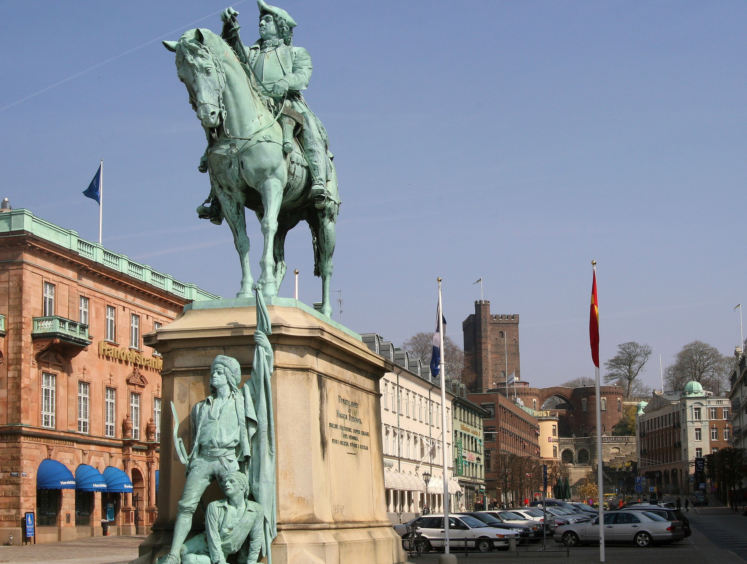 Helsingborg. Stortorget.